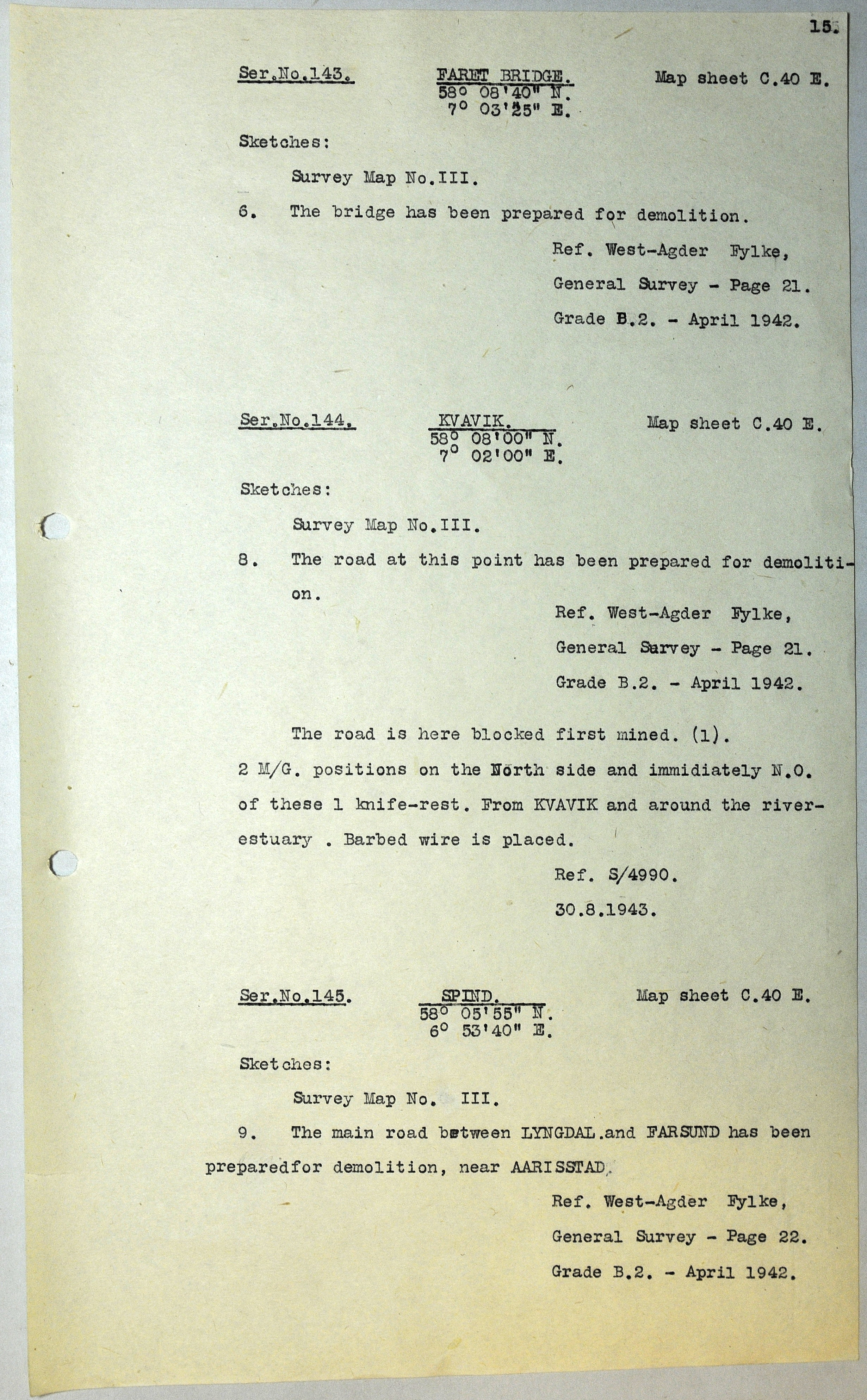 Etteretningsrapporter, forberedte sprengninger - Vest-Agder